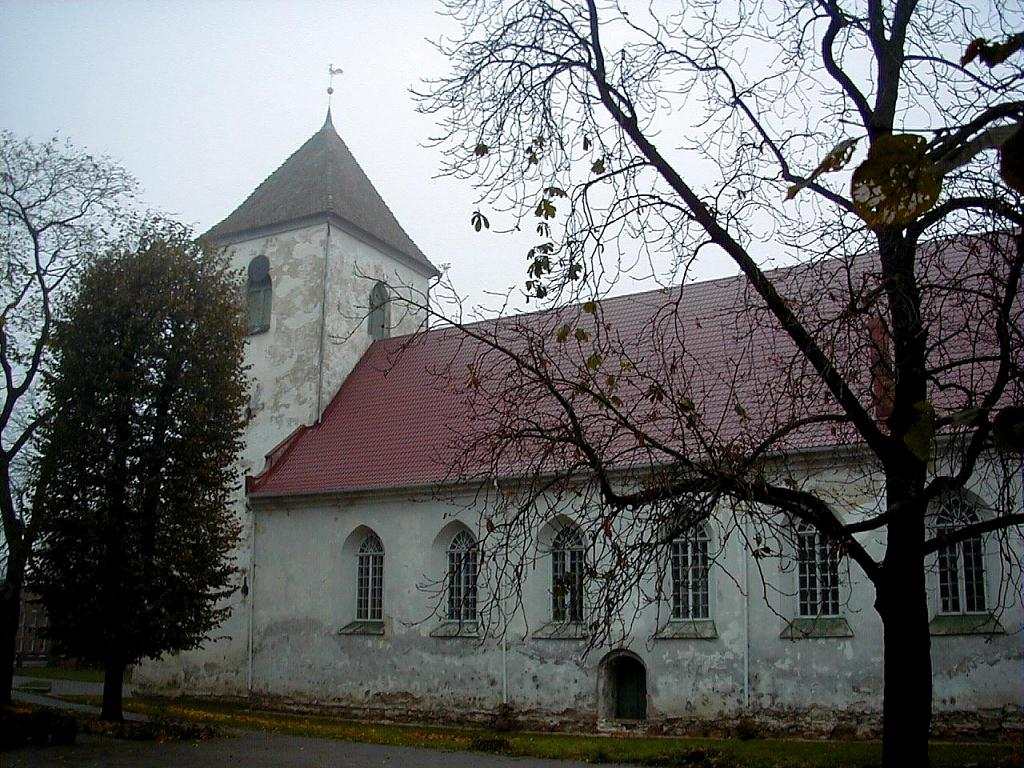 Bauskas luterāņu baznīca 2001-10-27